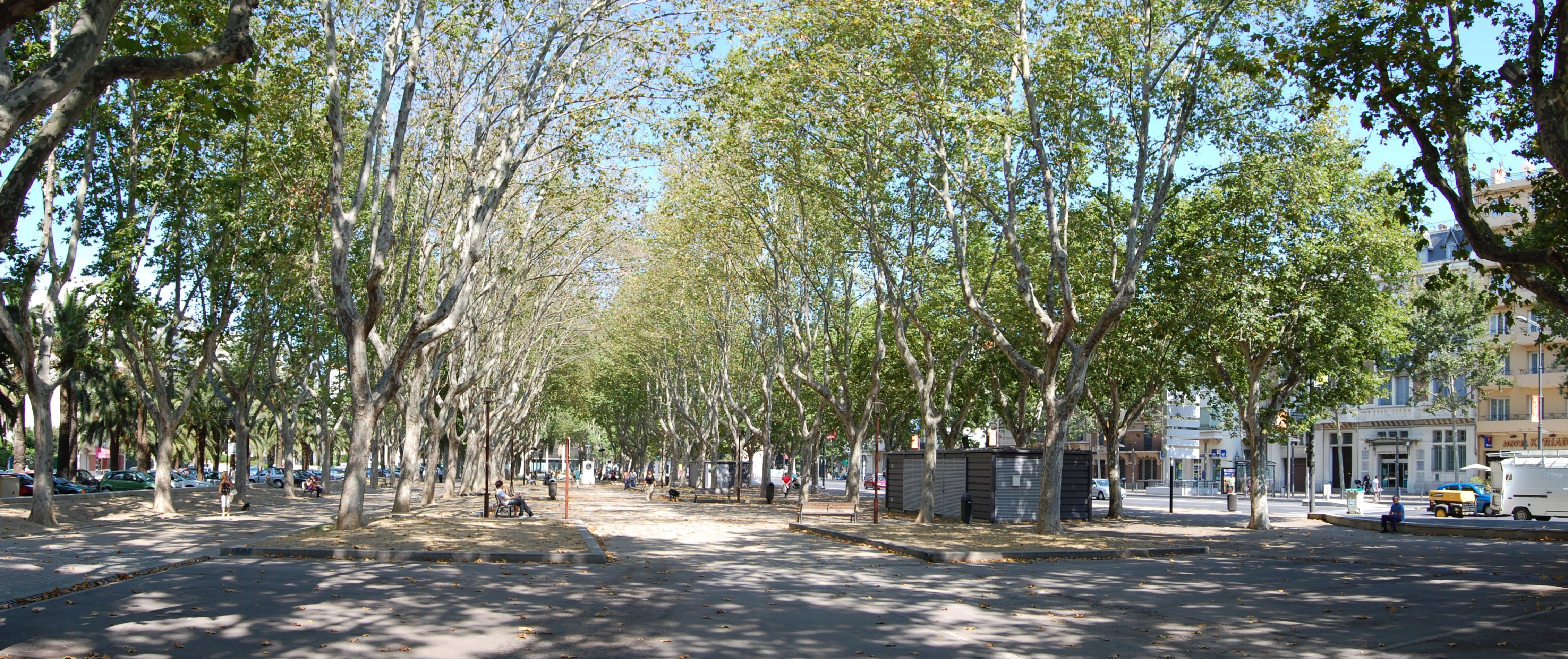 Promenade des Platanes à Perpignan. Travail personnel, sous licence CC-BY-SA-3.0. Appareil photo utilisé : Nikon D40